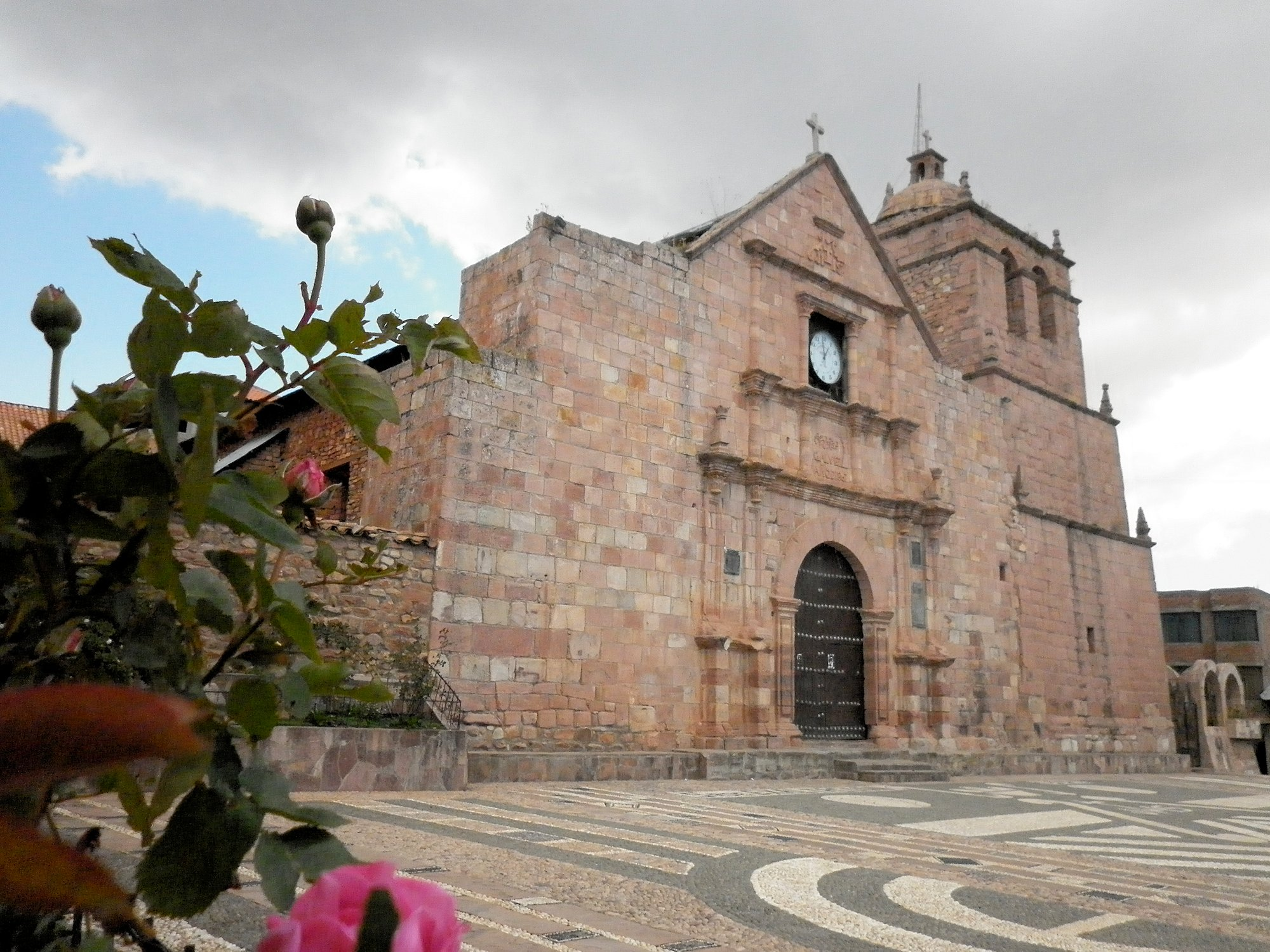 Catedral de Moho.